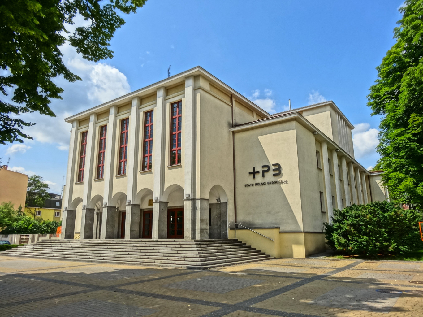 Budynek Teatru Polskiego w Bydgoszczy na rogu al. Mickiewicza i ul. 20 stycznia 1920